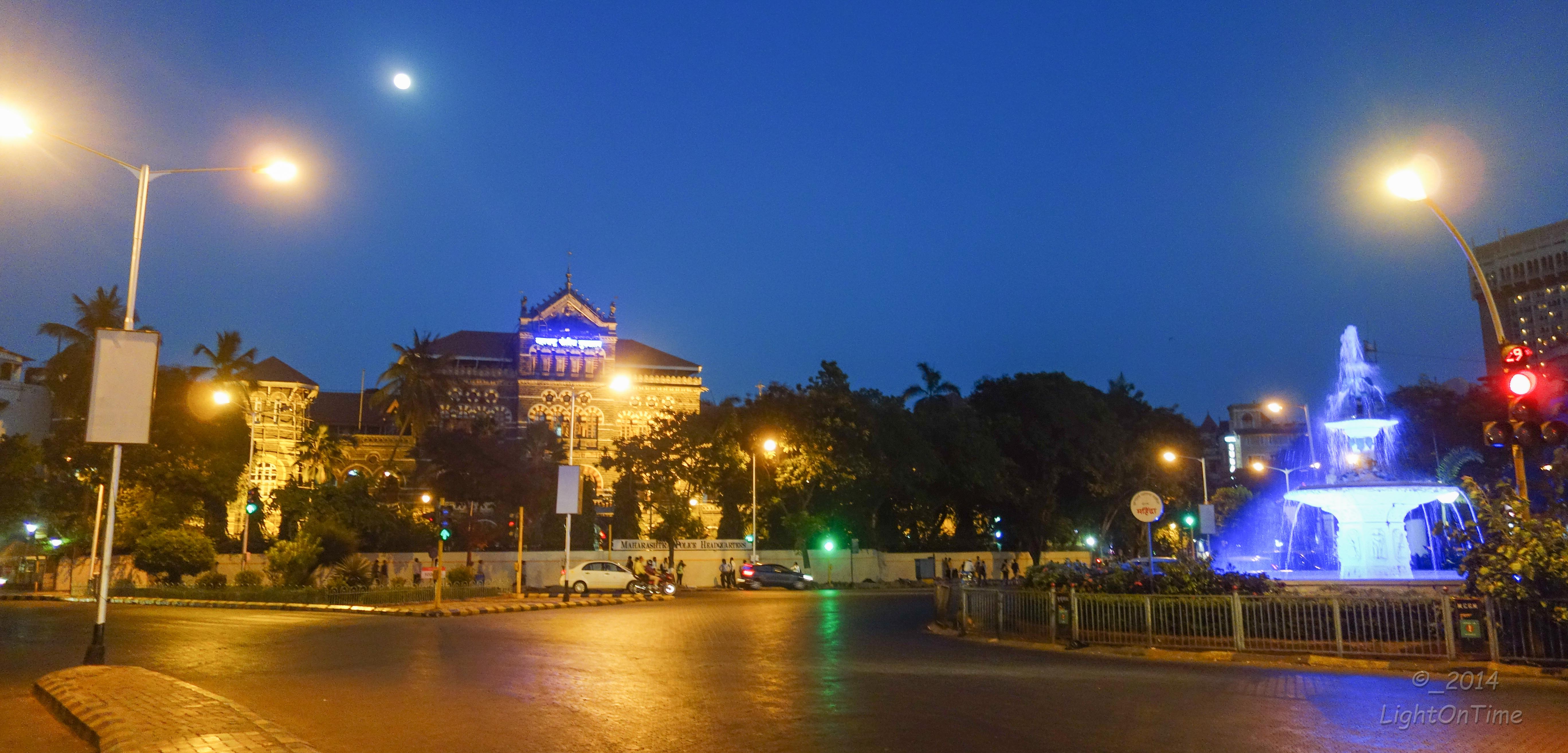 Maharashtra Police